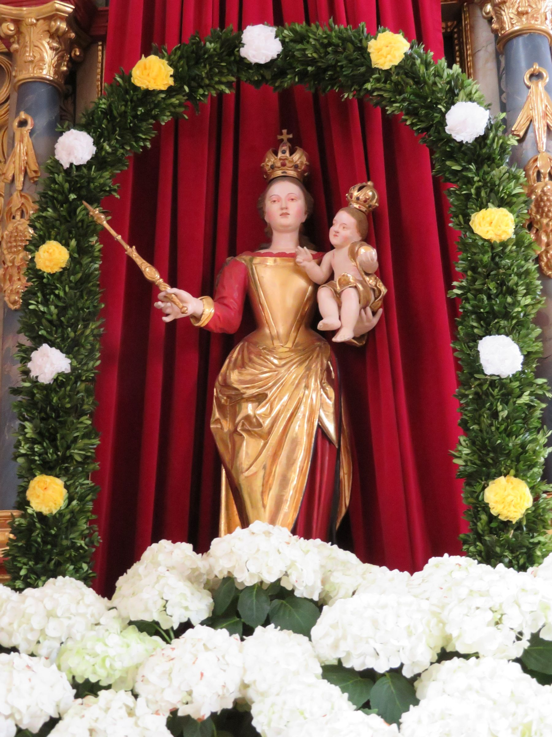 Wallfahrtskirche Oberbiederbach